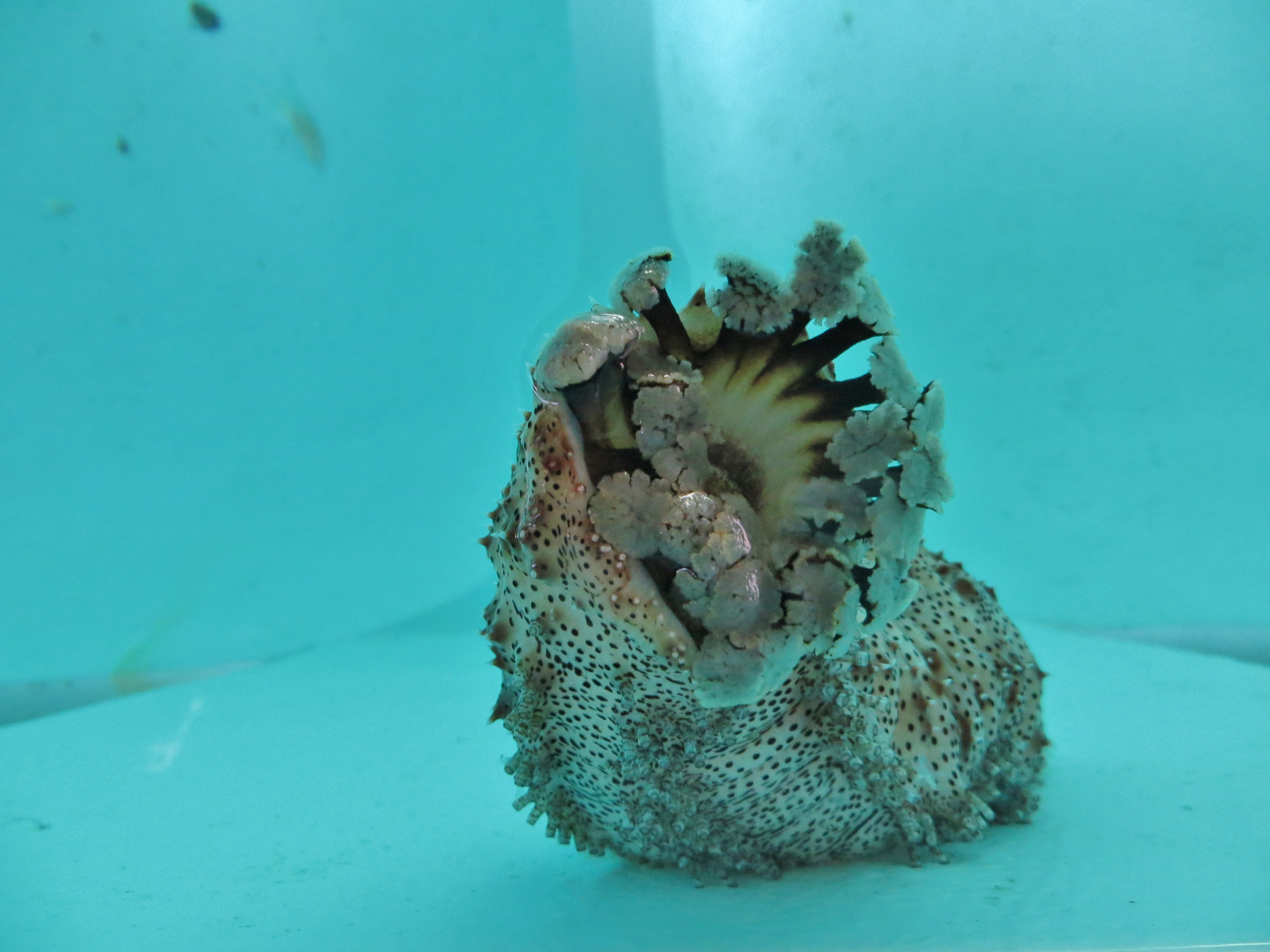 Gros plan sur les tentacules et la bouche d'une holothurie rayée (Pearsonothuria graeffei) aux Maldives.